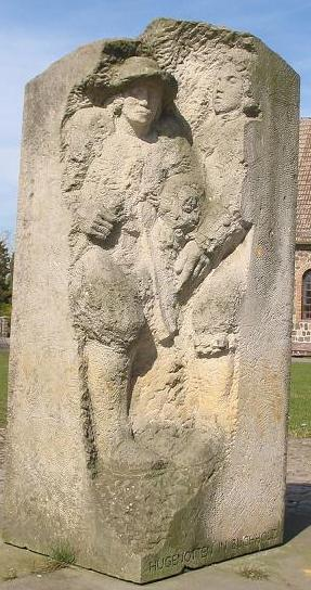 Relief "Hugenotten in Buchholz", in Französisch Buchholz, Berlin